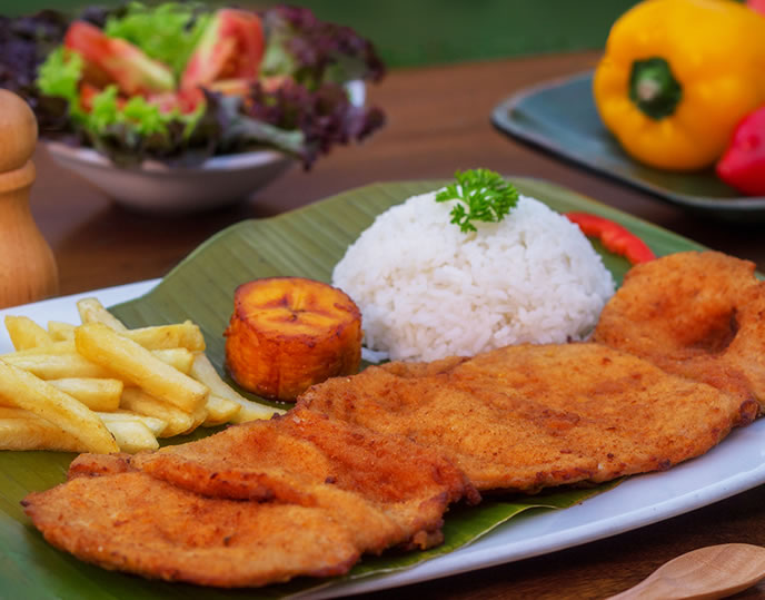 La chuleta valluna, es un plato típico de la región del Valle del Cauca - Colombia y la cultura Afrocolombiano del pacífico; es una milanesa, generalmente preparada empleando un corte magro de lomo de cerdo (aunque puede emplearse res o pollo). Suele ir acompañada con arroz, rodajas de tomate, cebolla, Tajada fritas de plátano maduro o papas fritas y una bebida llamada Lulada.